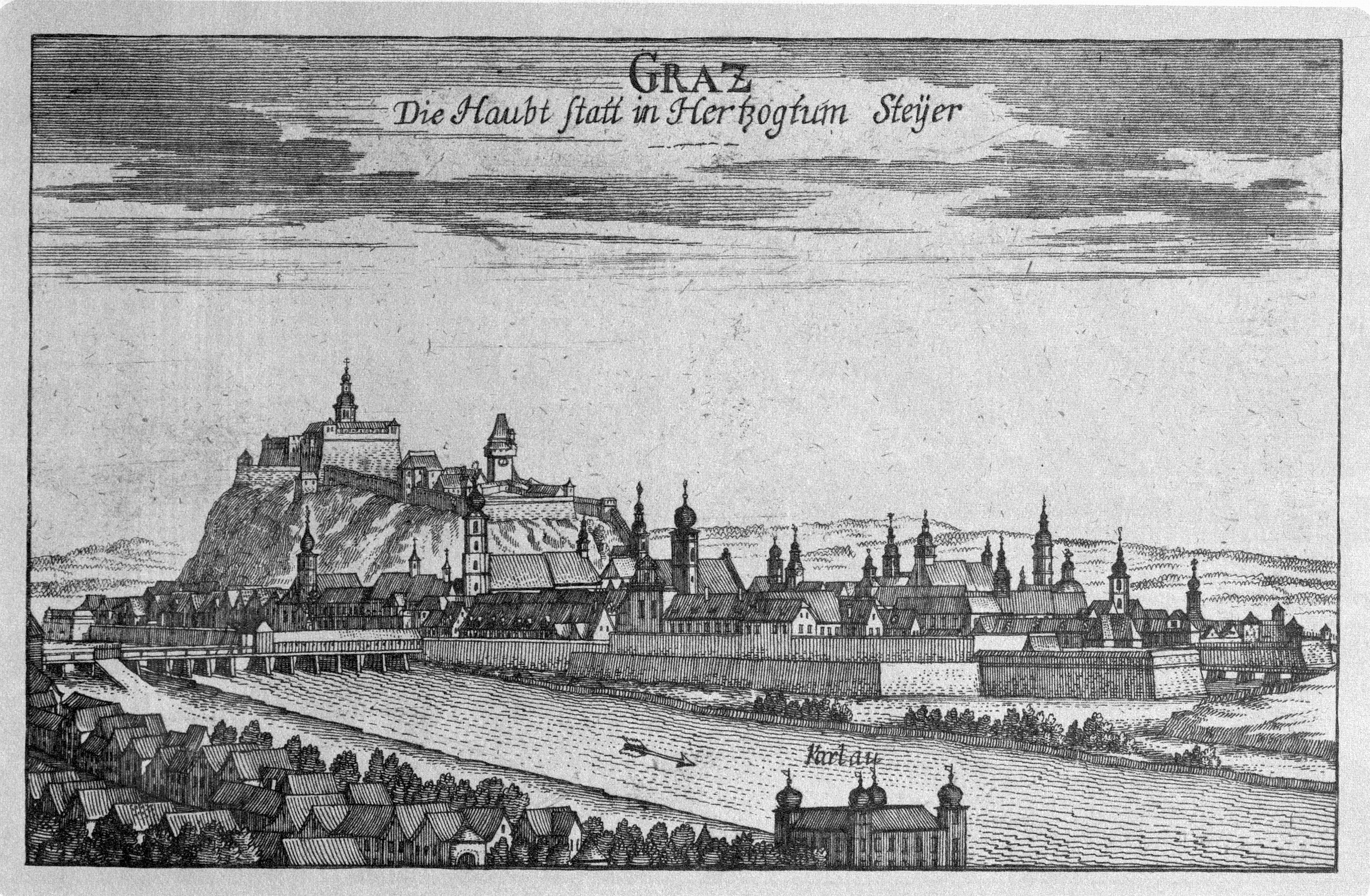 G. M. Vischers Käyserlichen Geographi, Topographia Ducatus Stiriae, Das ist: Eigentliche Delineation / und Abbildung aller Städte / Schlösser / Marcktfleck / Lustgärten / Probsteyen / Stiffter / Clöster und Kirchen / so es sich im Herzogthumb Steyrmarck befinden; Und anjetzo Umb einen billichen Preyß zu finden seynd Bey Johann Bitsch Universitäts Buchhandlern / Auff dem Juden=Platz bey der guldenen Saulen. Graz 1681 Die Nummerierung der Dateien folgt der alphabetischen Reihung der Ortsnamen